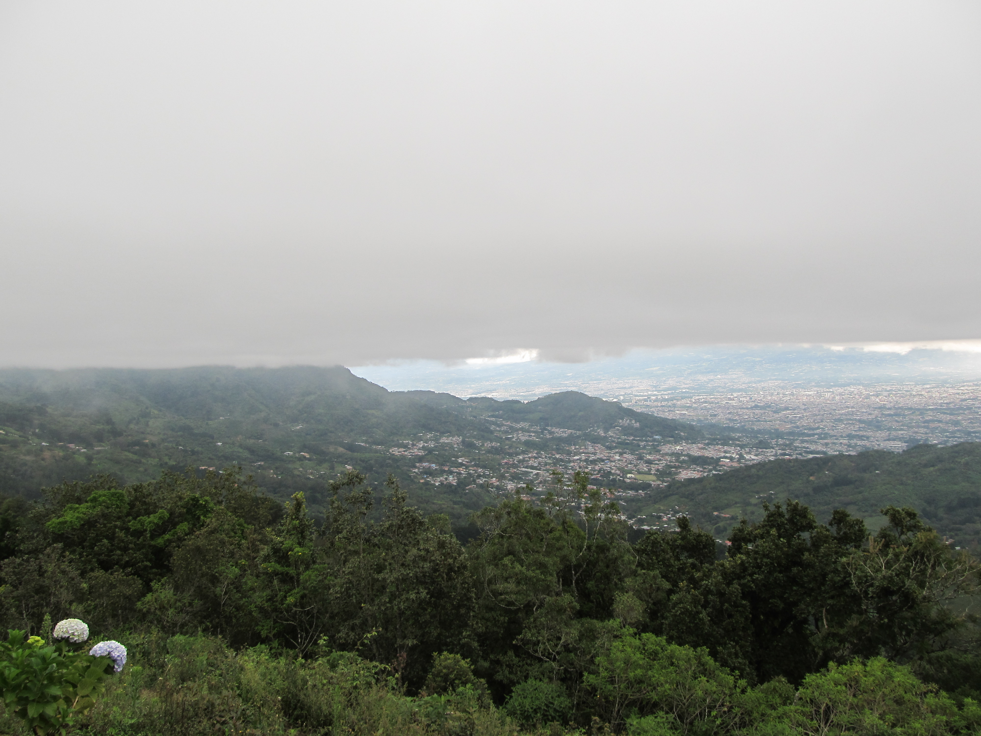 Vista de San José de Costa Rica desde Tarbaca, Aserrí, San José, Costa Rica.